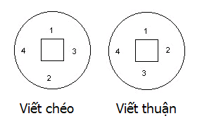 Nhận dang tiền cổ, vị trí các chữ trên đồng tiền.